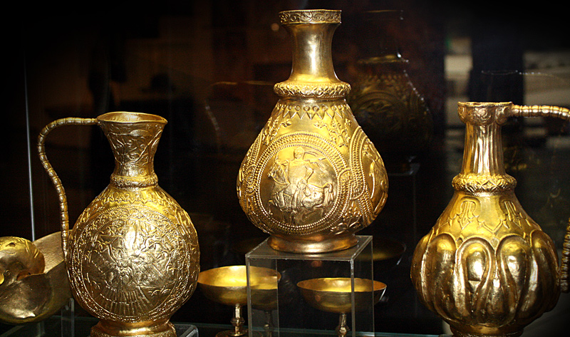 Съдове от Наг Сент Миклошкото златно съкровище